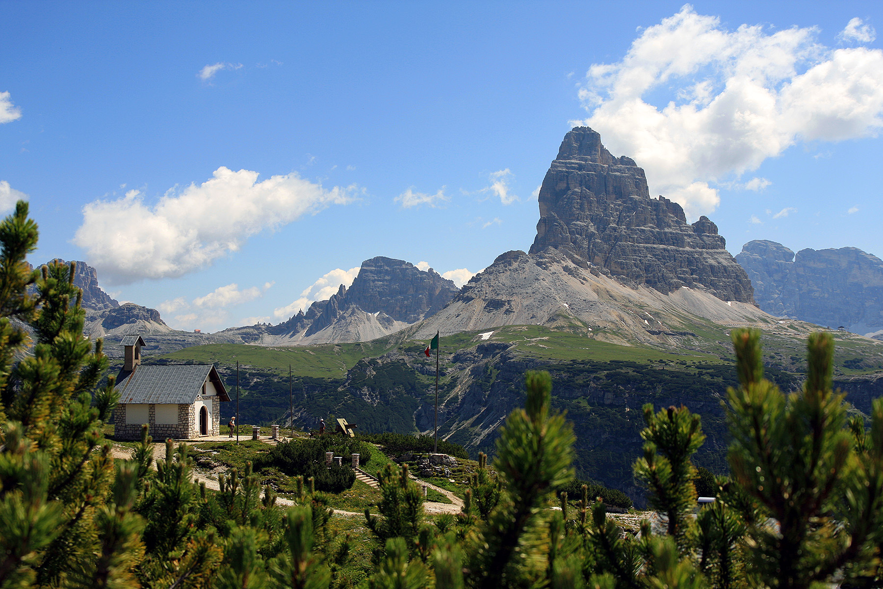 Le Tre Cime di Lavaredo dal Monte Piana